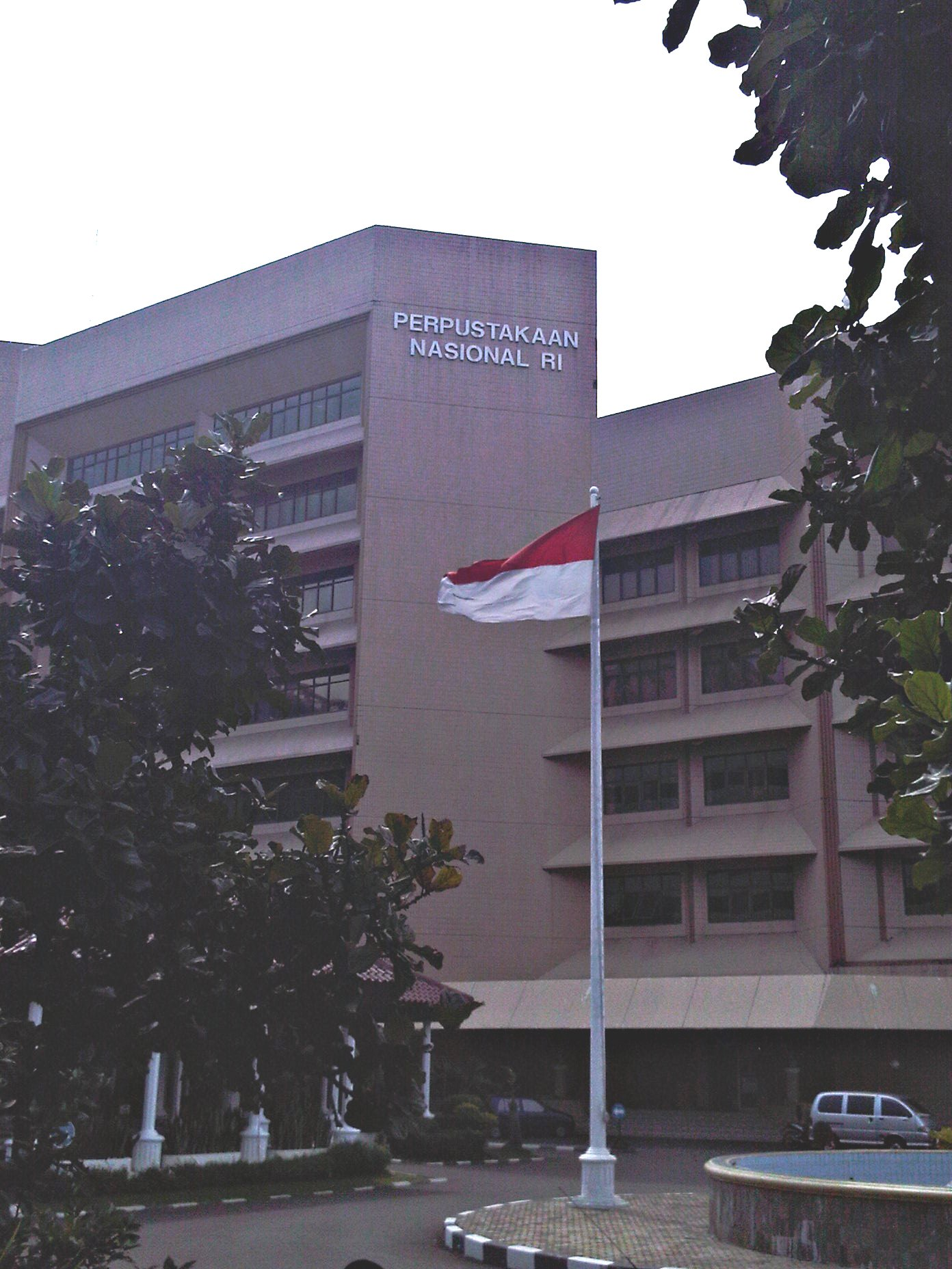 Perpustakaan Nasional, National Library